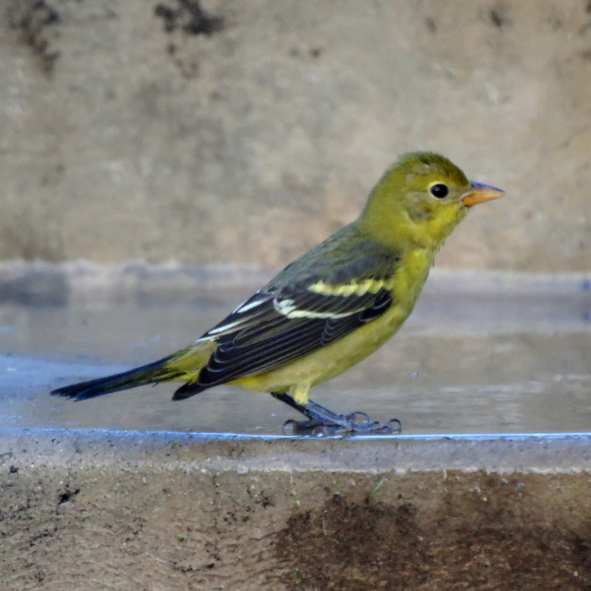 Hooded Oriole (juvenile)